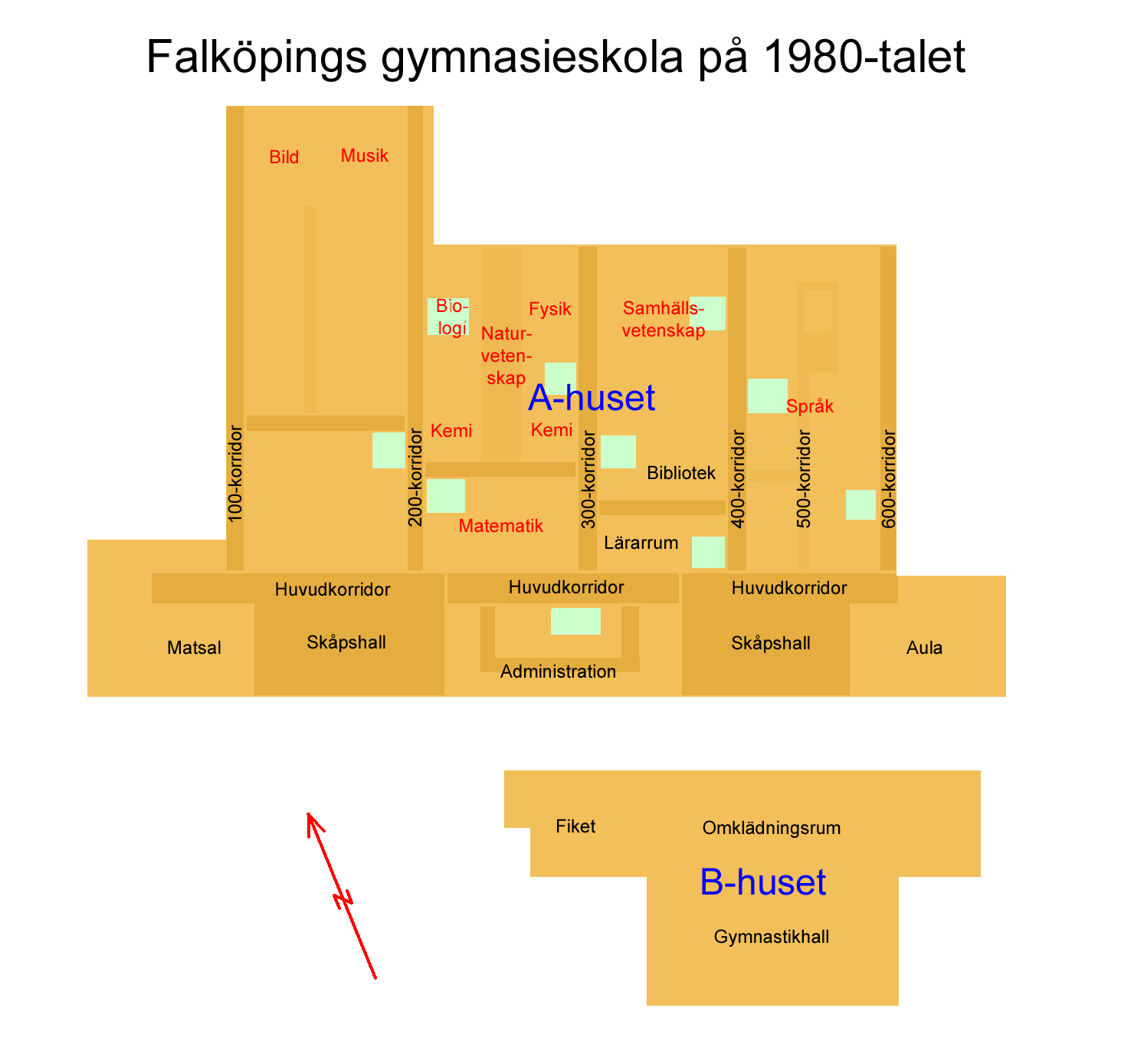 Enkel karta över A-huset och B-huset på Falköpings gymnasieskola under 1980-talet (senare kallat Ållebergsgymnasiet) i Falköping, Falköpings kommun, f.d. Skaraborgs län, Västergötland, Västra Götalands län, Sverige. A-huset byggdes 1974, men drabbades snart av fuktskador och revs därför våren 2013. I A-huset var det främst undervisning i teoretiska ämnen, medan det i B-huset främst var undervisning i gymnastik/idrott. A-huset låg i kvarteret Väduren öster om Hollendergatan. Undervisning i praktiska ämnen skedde mest i C-huset, som dock inte är med på denna karta eftersom det ligger i kvarteret Pinjen väster om Hollendergatan.